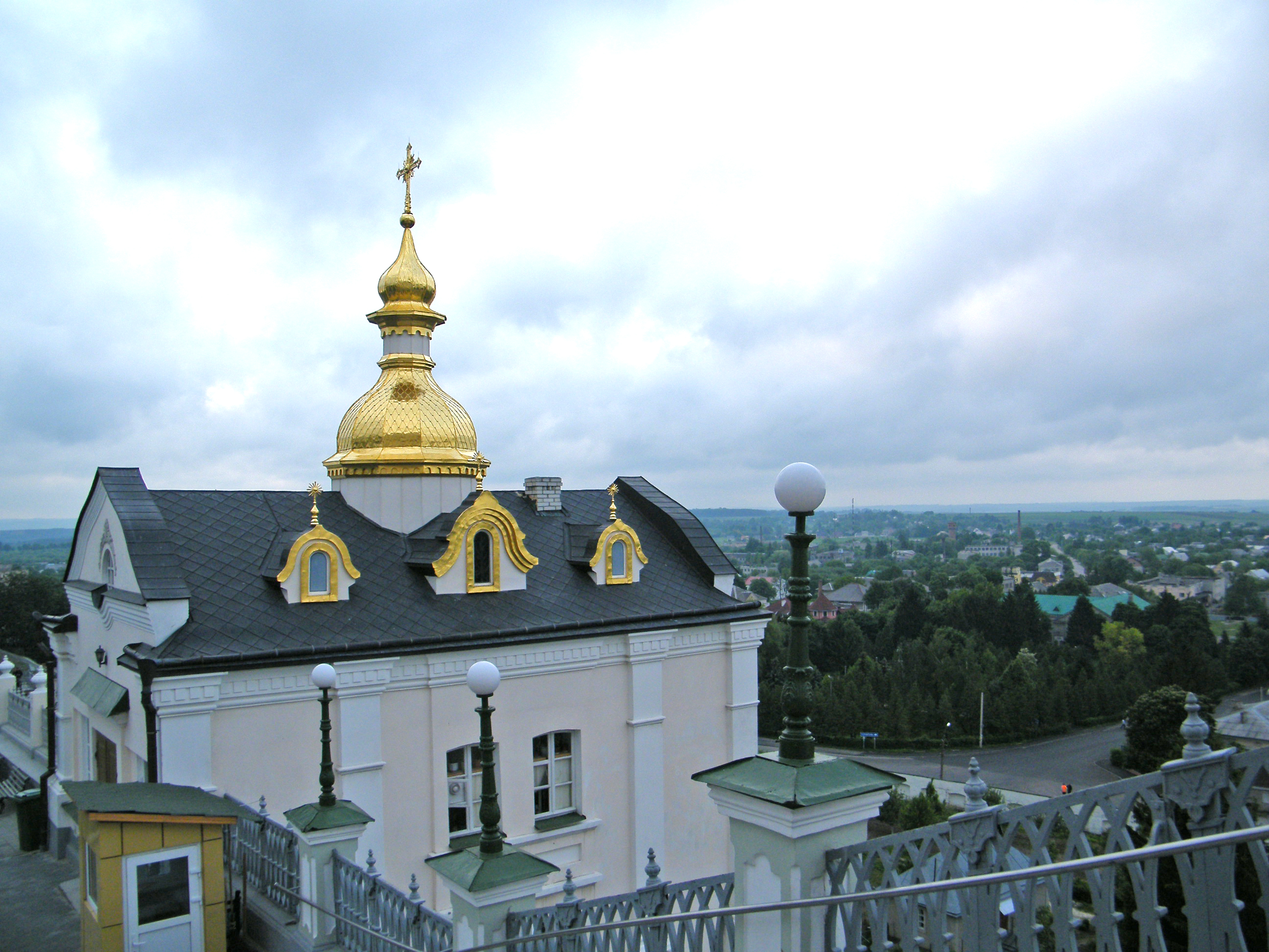 Церковь Великомученицы Варвары